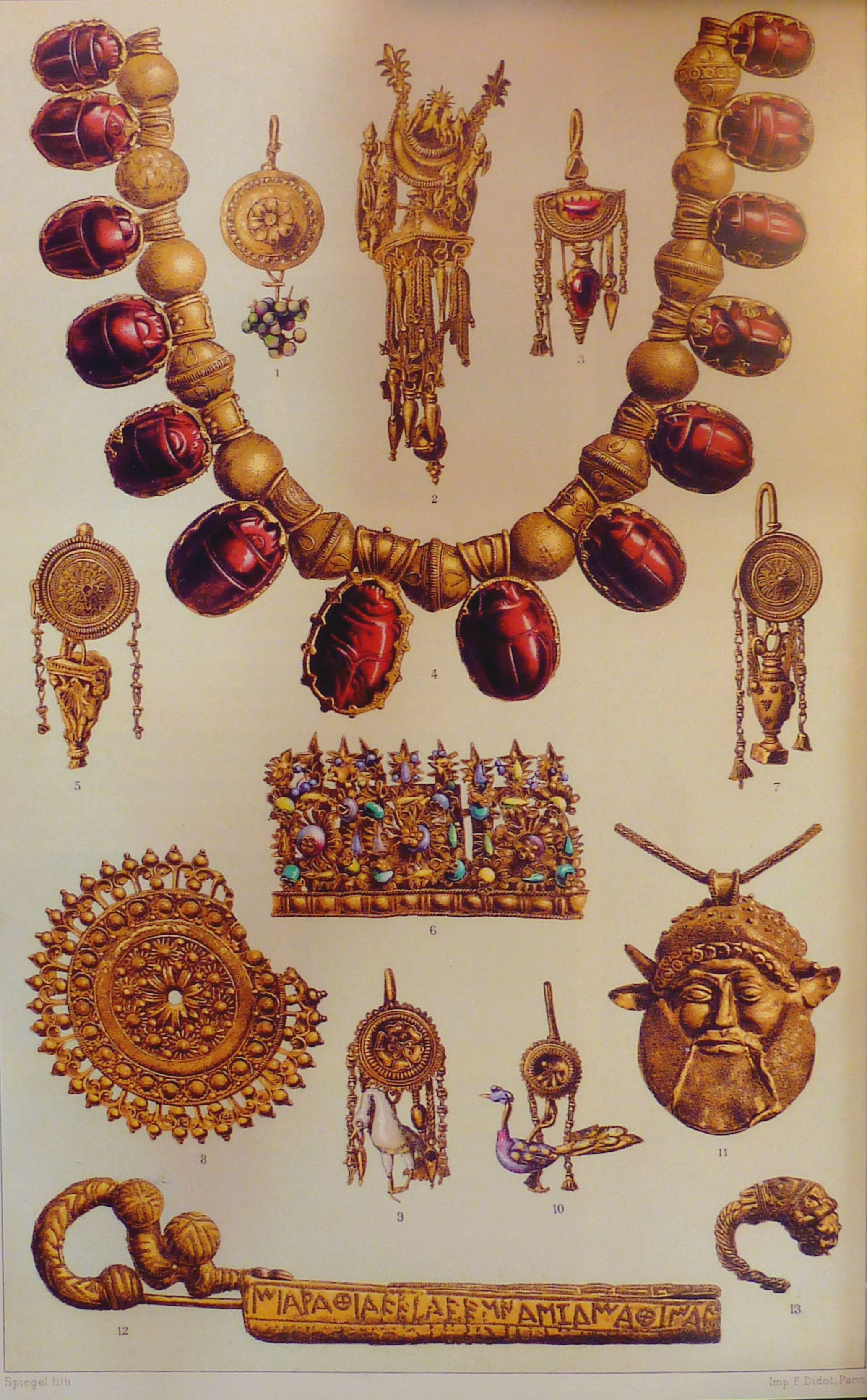 Planche lithographique extraite de L'Art étrusque de Jules Martha, Firmin Didot, Paris 1889. Bijoux de la collection Campana et autres bijoux de la tombe François et de Bolsena.